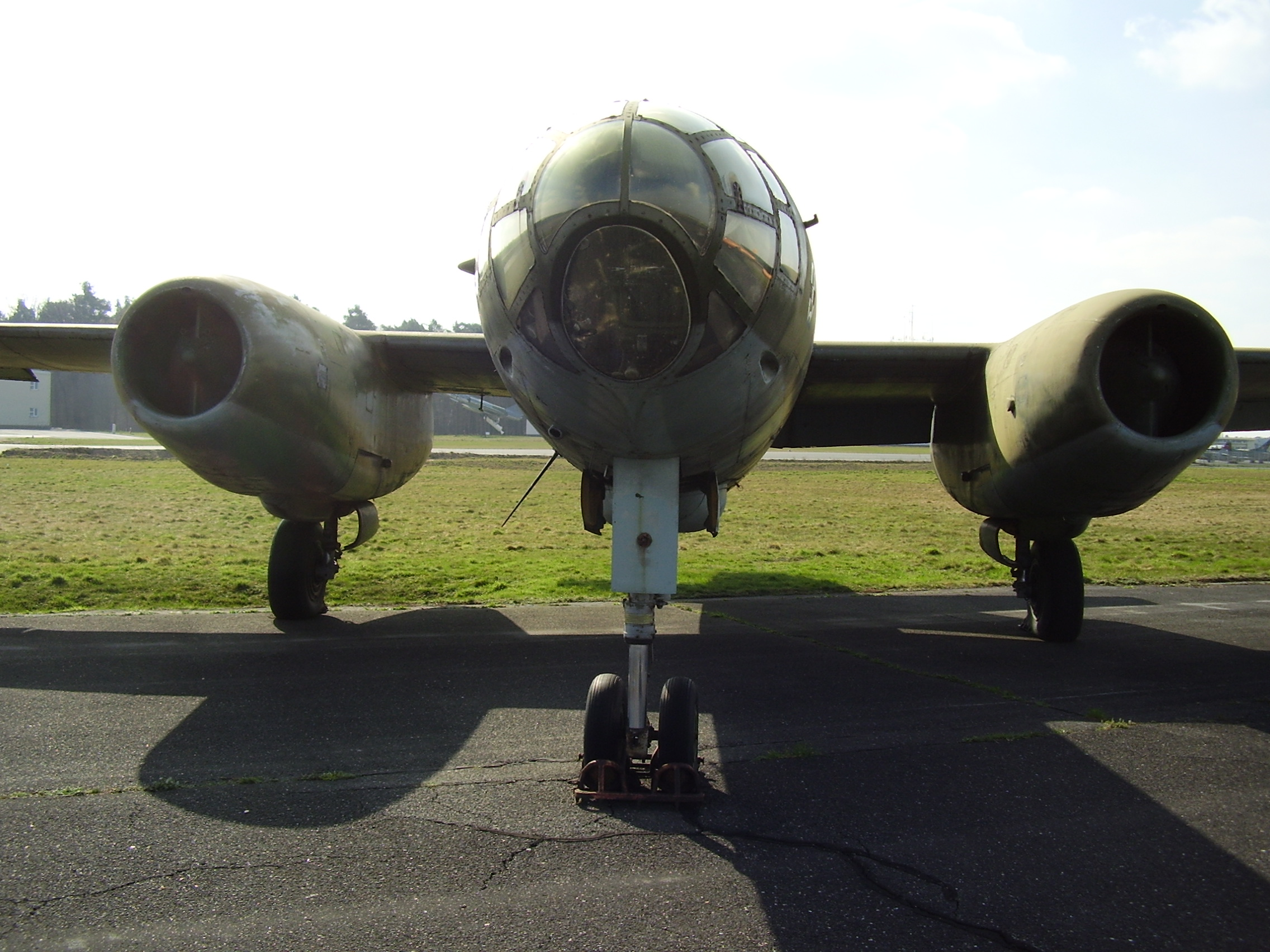 Luftwaffenmuseum der Bundeswehr; Airforce Museum of the Bundeswehr; Berlin-Gatow